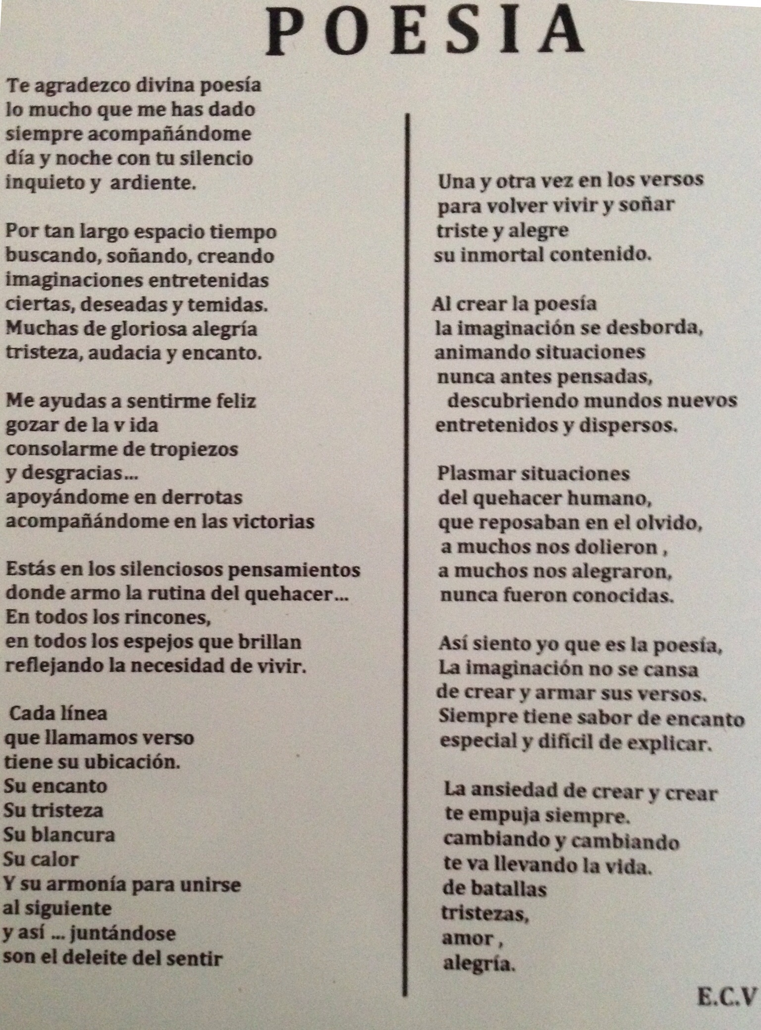 Fotografía capturada el 30 de enero de 2014 sobre el original de este poema que se encuentra en poder de la Fundación que lleva su nombre. Esta fotografía muestra el poema inédito del poeta Eugenio Cruz Vargas. Este fue publicado por la Fundacion Eugenio Cruz Vargas el domingo 18 de enero de 2015 en el diario El Mercurio de Santiago página A25.